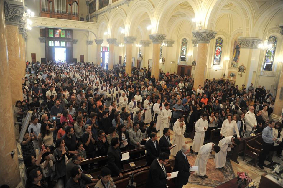 Más de 60 clérigos, entre sacerdotes, diáconos, obispos y el cardenal Juan Luis Cipriani se hicieron presentes en la misa de cuerpo presente del padre.